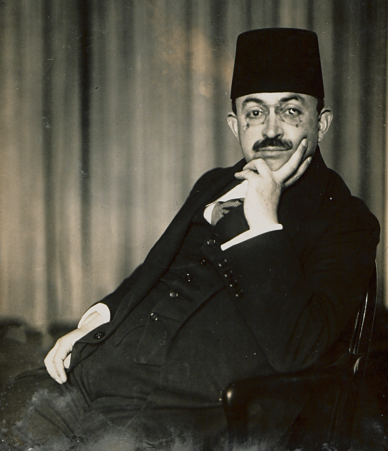 Djavid-Bei die neueste Aufnahme des bekannten türkischen Finanzmannes und Politikers, der z. Zt. in Berlin weilt